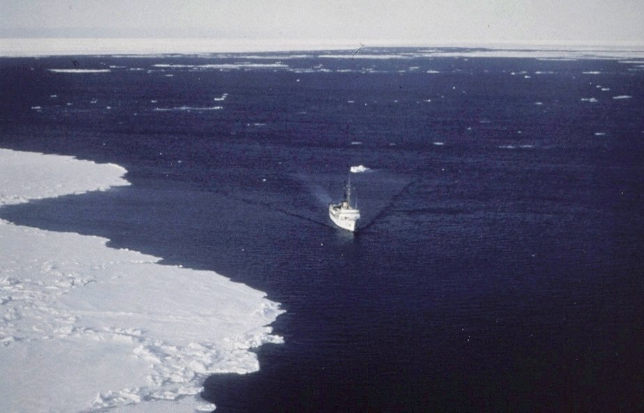 NOAA Surveyor